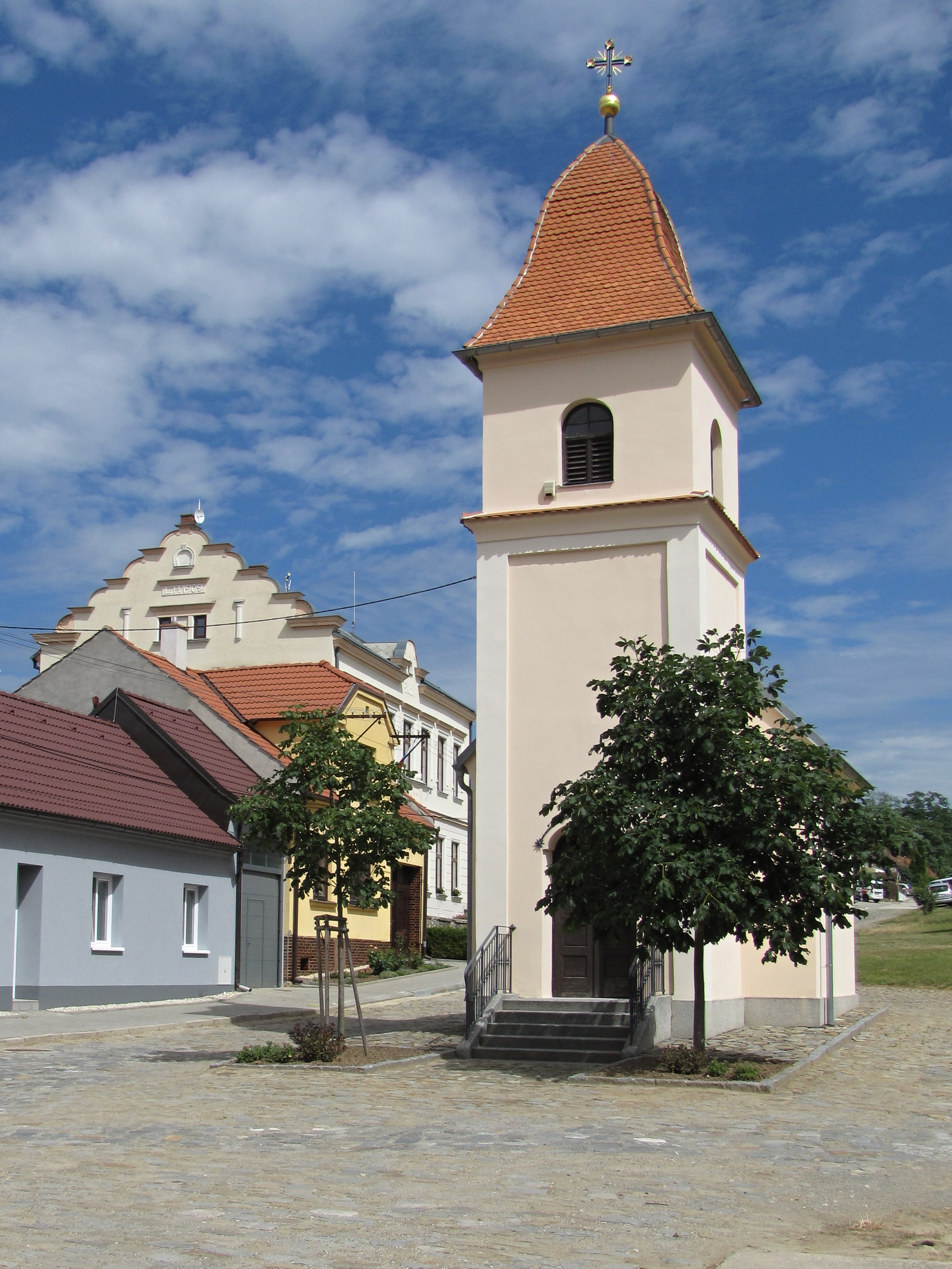 Kaple Navštívení Panny Marie z roku 1817 v Kelčanech